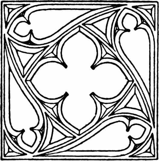 Zeichnung eines Vierschneuß in viereckigem Rahmen aus "A Handbook of Ornament" von Franz Sales Meyer (1898)